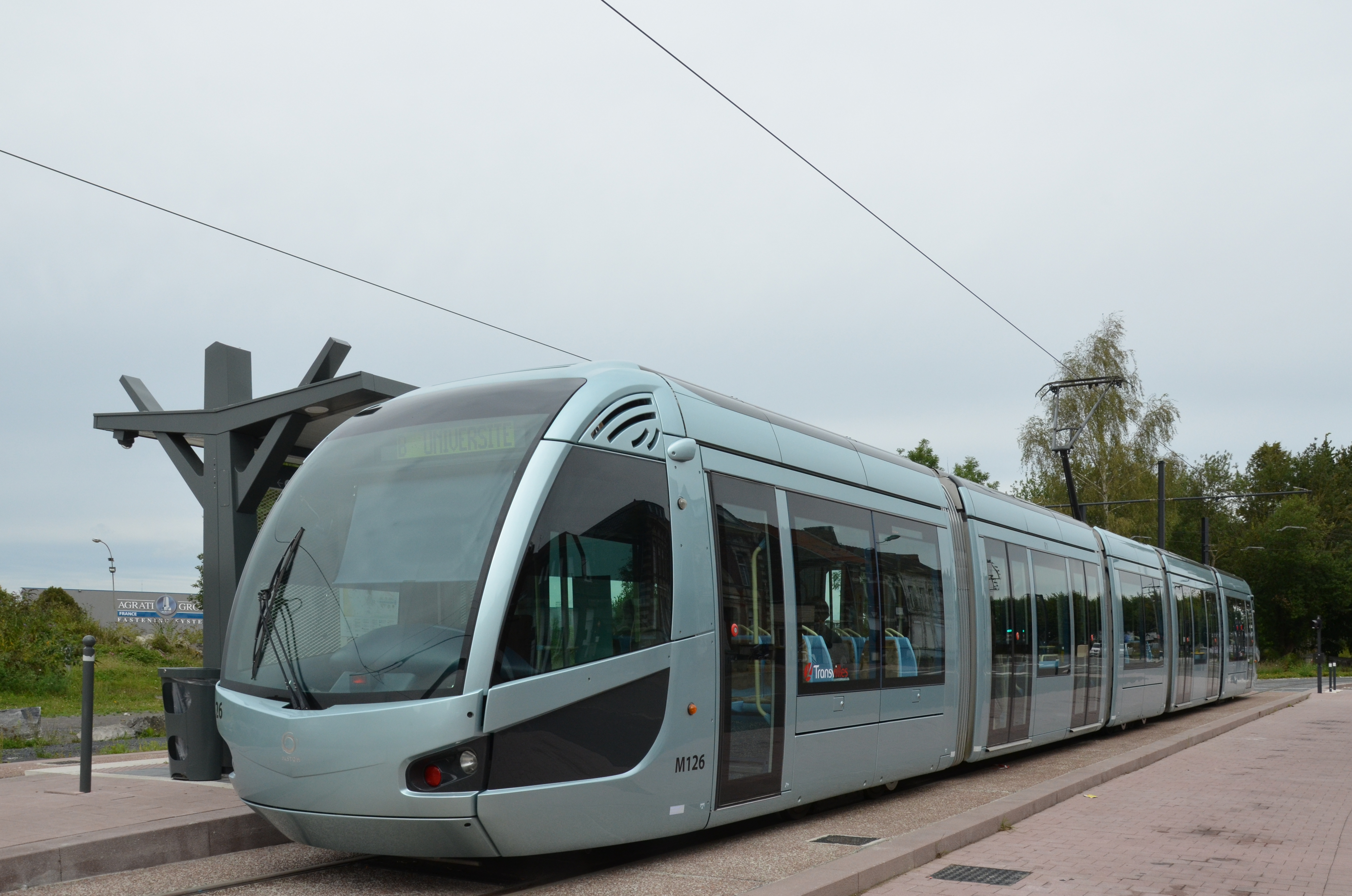 Alstom Citadis 302 n°26 sur la ligne T2 du réseau TRANSVILLES de Valenciennes, au terminus Le Boulon à Vieux-Condé.